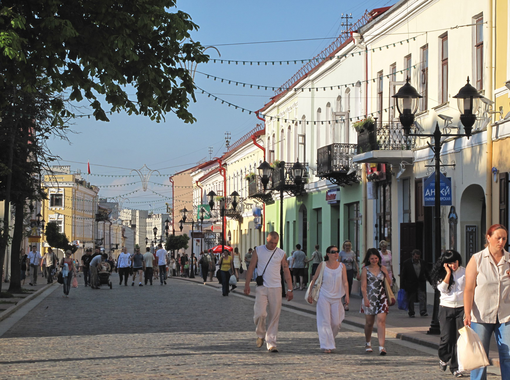 Беларуская (тарашкевіца): Октябрь